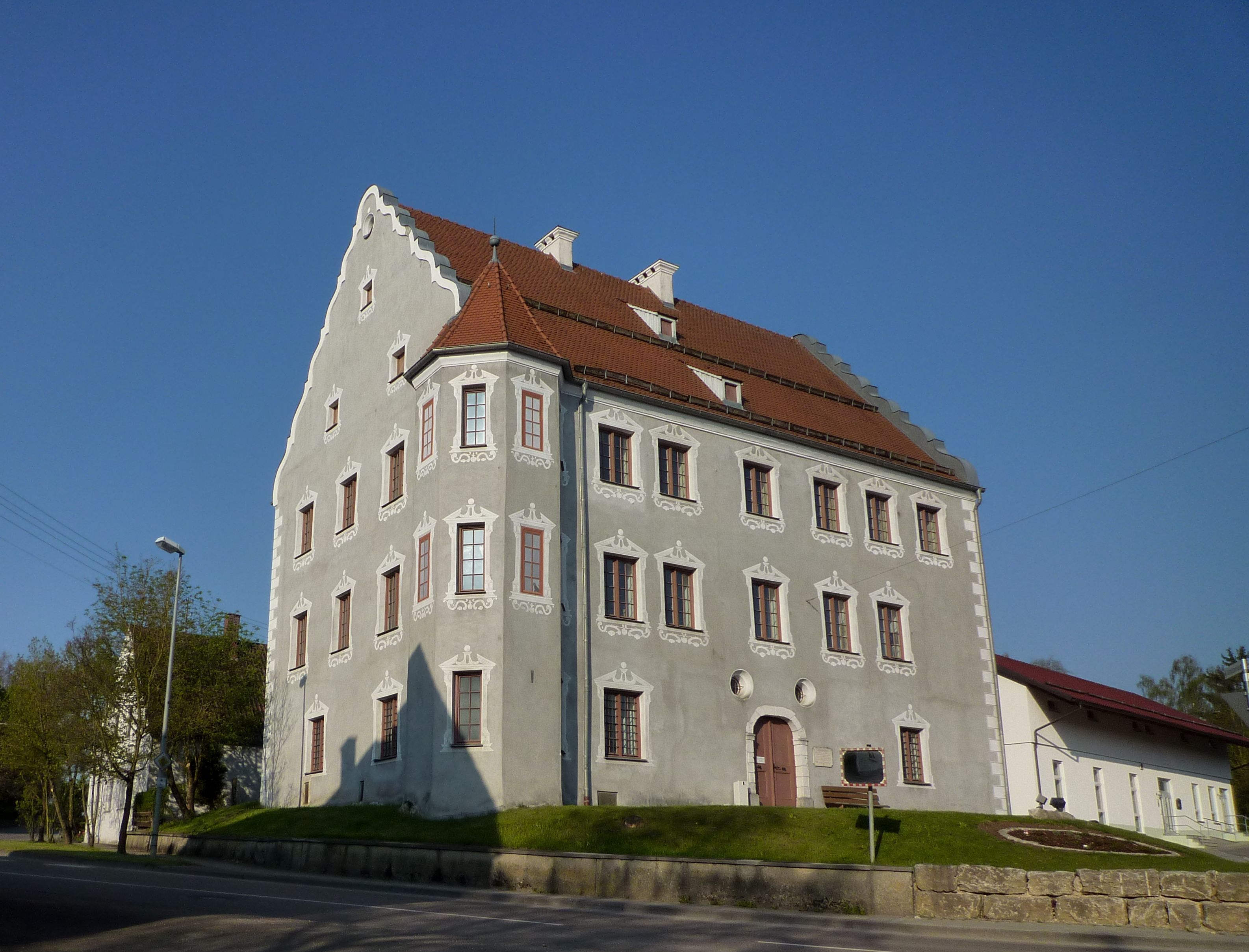 Dischingen, Schloss Ballmertshofen